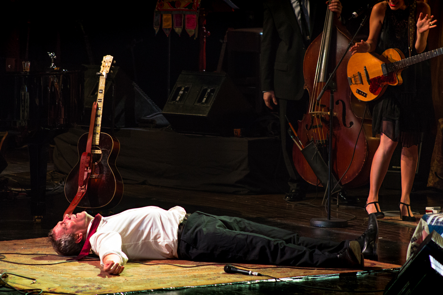 Hugh Laurie Gig in Belo Horizonte - Brazil